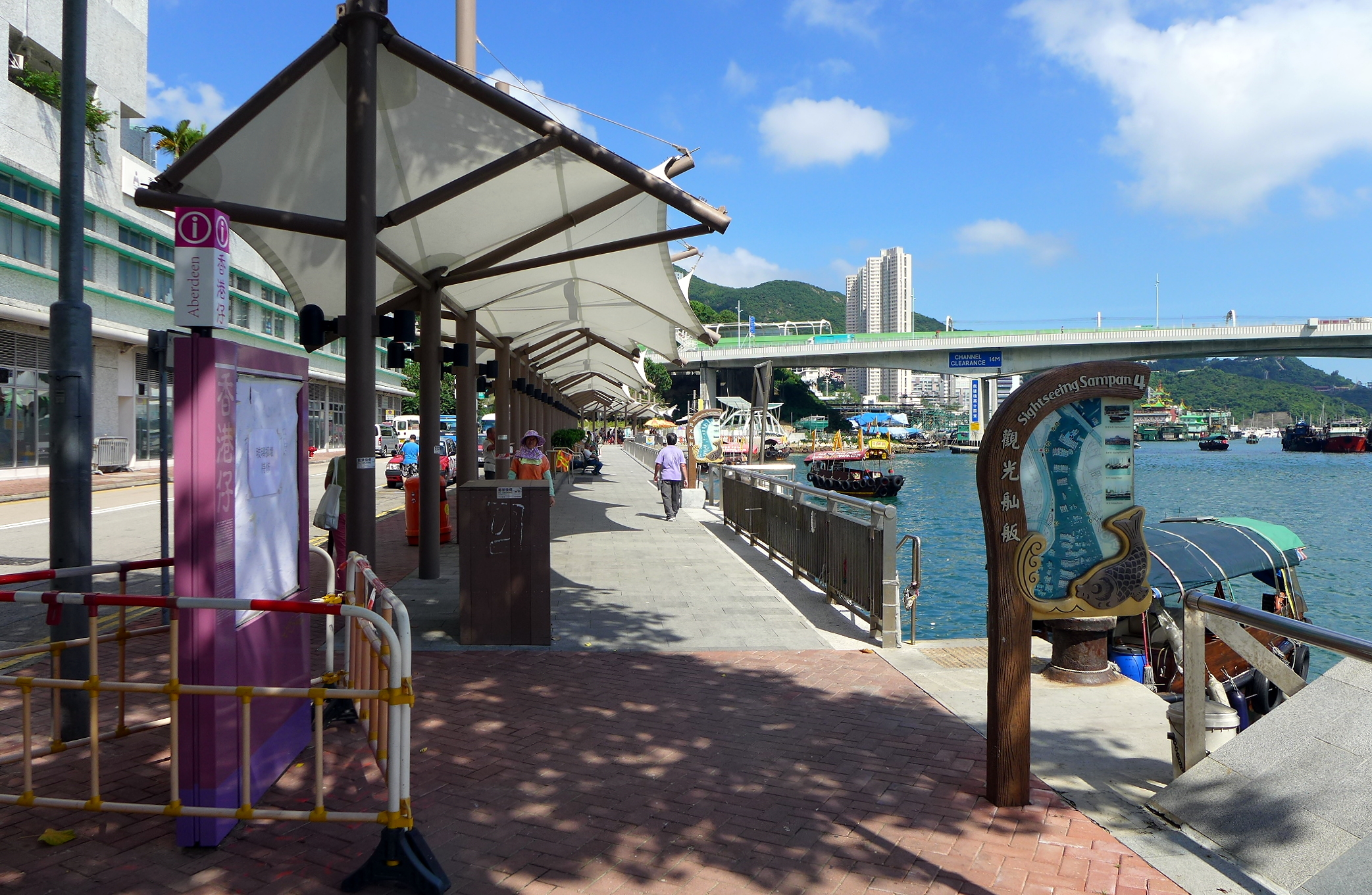 Aberdeen Sightseeing Sampan Pier